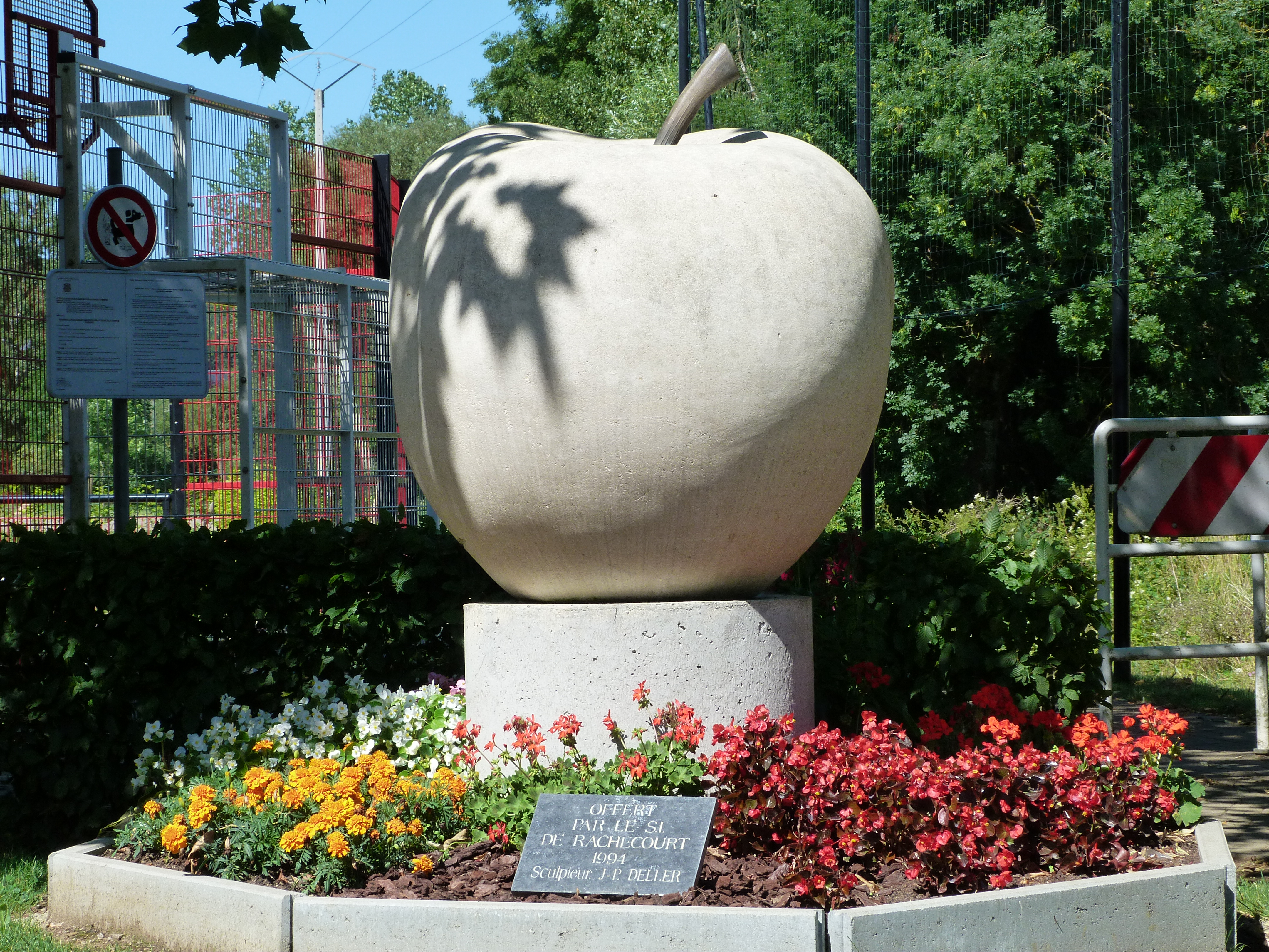 La sculpture de la Pomme de Rachecourt en août 2013.